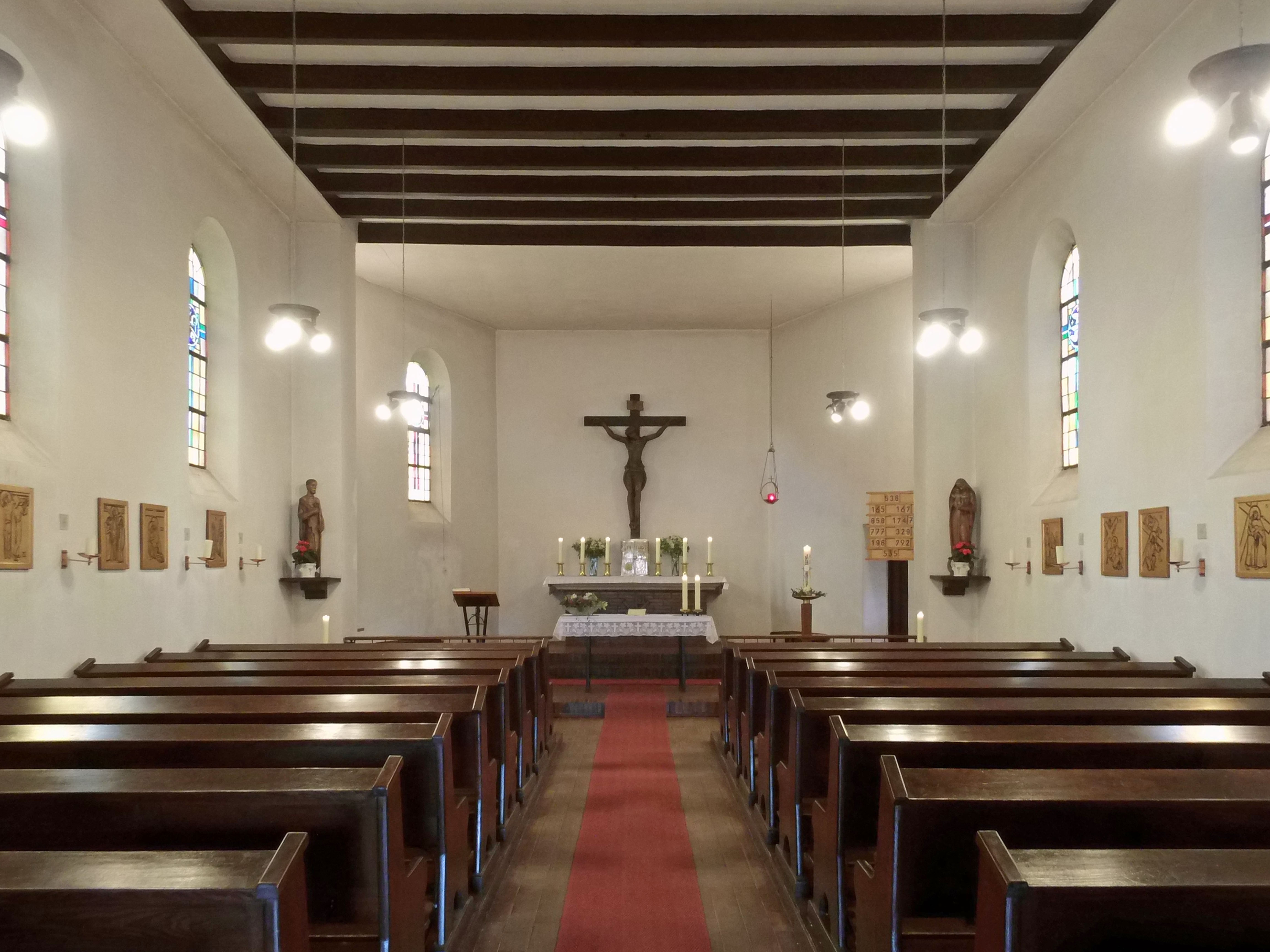 Römisch-katholische Kirche St. Johannes Baptist in Seehausen (Landkreis Stendal)